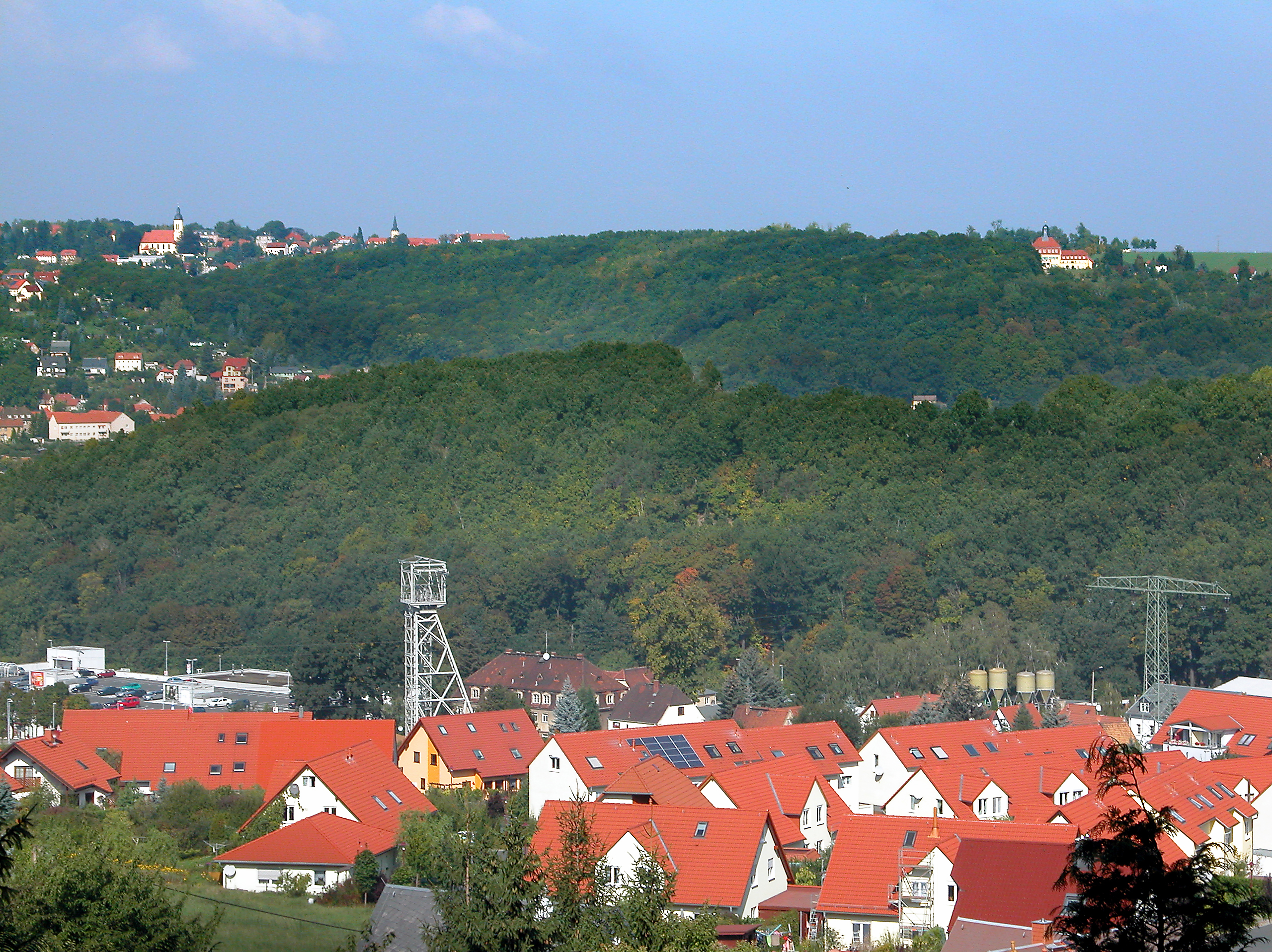 26.09.2008 01705 Freital: Blick vom Windberg nach Norden über Freital-Burgk mit dem alten Förderturm, dann dem Osterberg und weiter bis Pesterwitz mit der Jakobuskirche, rechts davon dem Schloßturm und ganz rechts im Bild dem Jochhöhschlößchen in Pesterwitz-Neunimptsch. [DSCN34190.TIF]20080926110DR.JPG(c)Blobelt